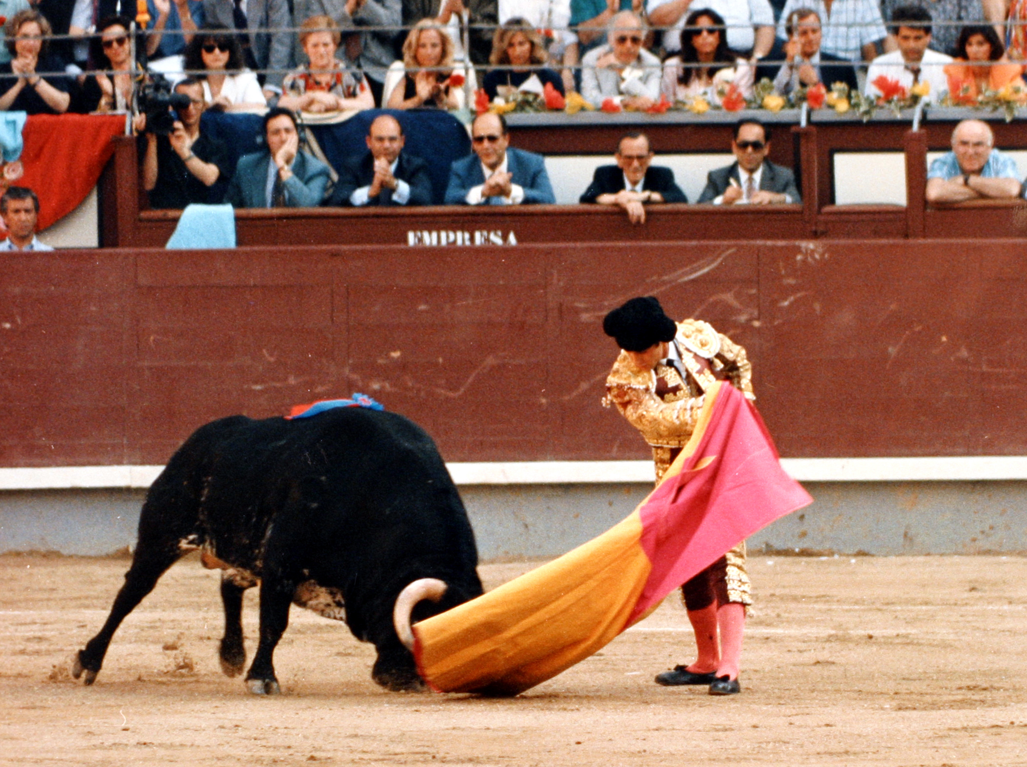 La brionesa es un lance de capa, ejecutado a una mano. tiene su origen en el diestro mexicano Luis Briones. Esta la ejecuta el diestro José Miguel Arroyo, Joselito, durante la corrida de Beneficencia en Madrid, el 17 de junio de 1993